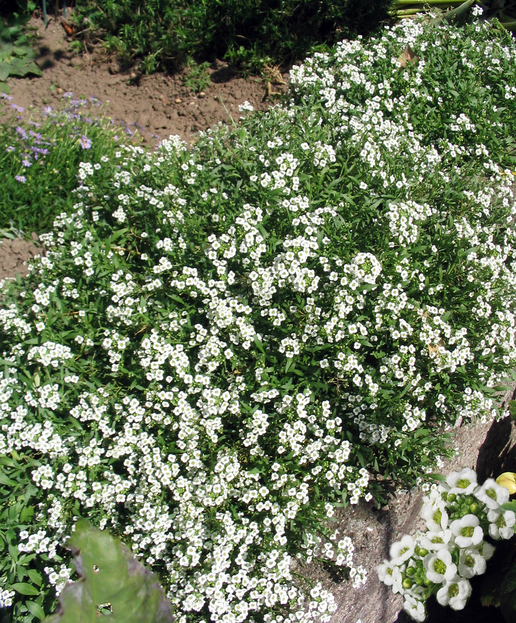 Strandkresse (Lobularia maritima) / vergrößerte Darstellung der Blüten in der rechten unteren Ecke